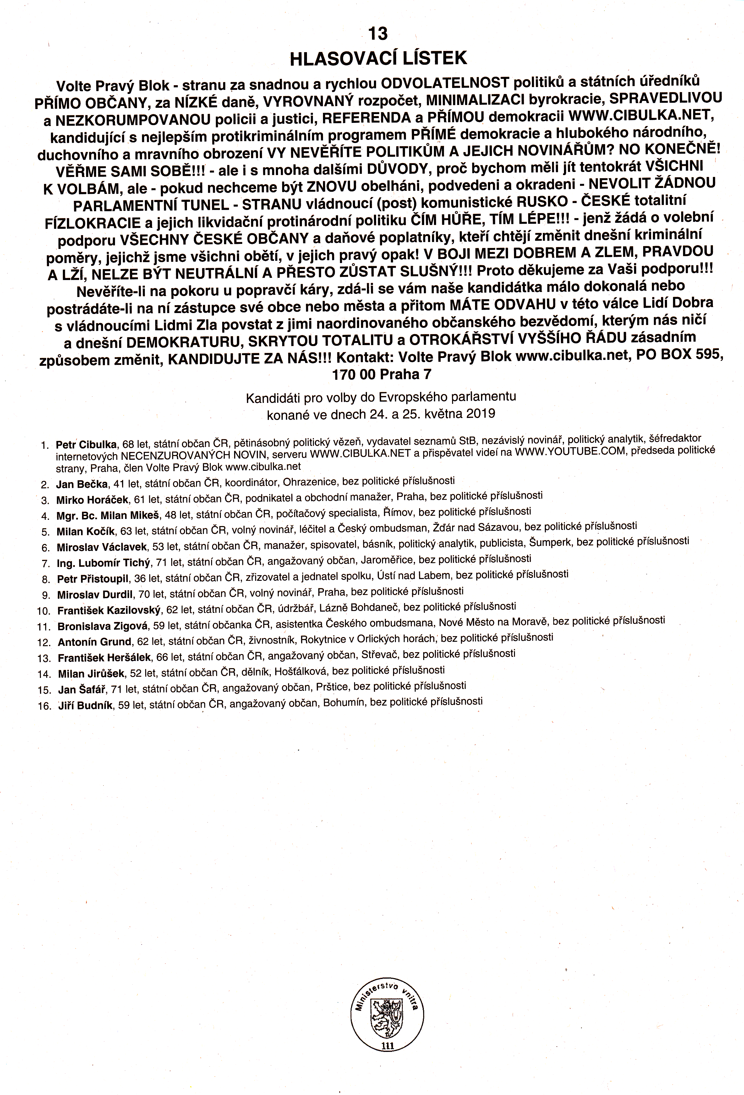 Volební lístek politické strany Petra Cibulky ve volbách do Evropského parlamentu v roce 2019.